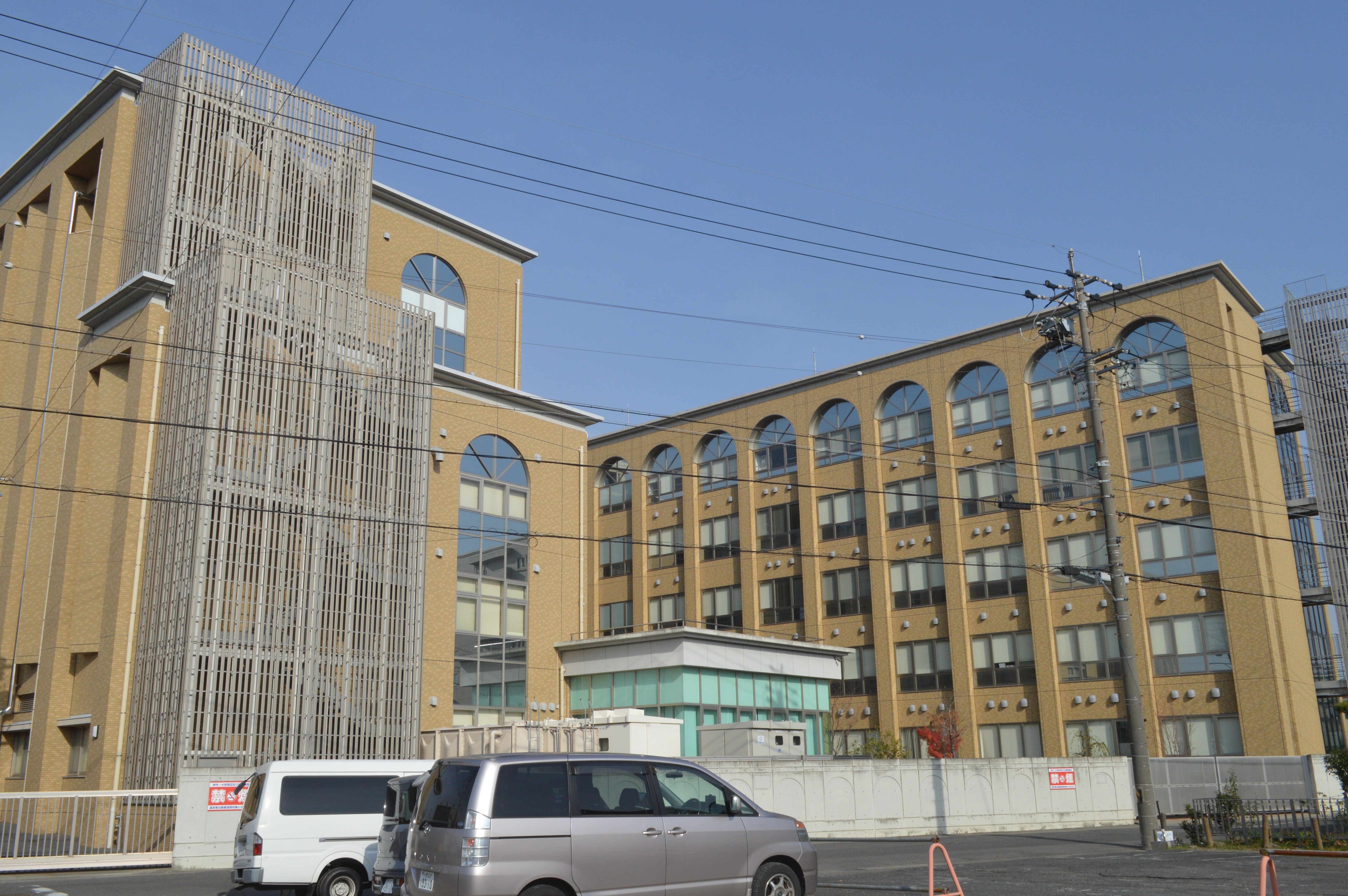 修文大学。愛知県一宮市に本部を置く私立大学。